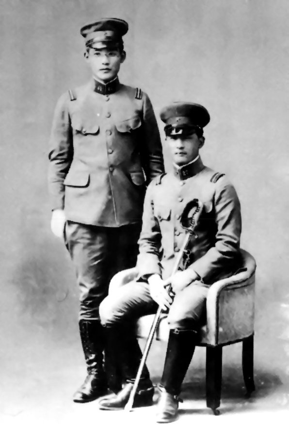 菅波三郎と親泊朝省